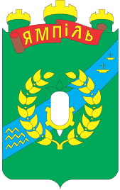 Герб Ямпoля 1985 року. Затверджений 22.10.1985р. рішенням N321 виконавчого комітету міської ради. У зеленому полі лазуровий перев'яз праворуч із двома недобудованими золотими галерами і хвилями. У центрі - срібний цукровий буряк із трьома зеленими листами, обрамлена двома золотими колосками. Щит увінчаний трьома вежами, на яких покладений червоний пергамент із золотою назвою міста українською мовою. Тло щита означає поля і ліси району. Червоний колір пергаментного листа і лазуровий - ріки, символізують колір Державного прапора Української РСР. Автори - А.Майоров, А.Плешко.